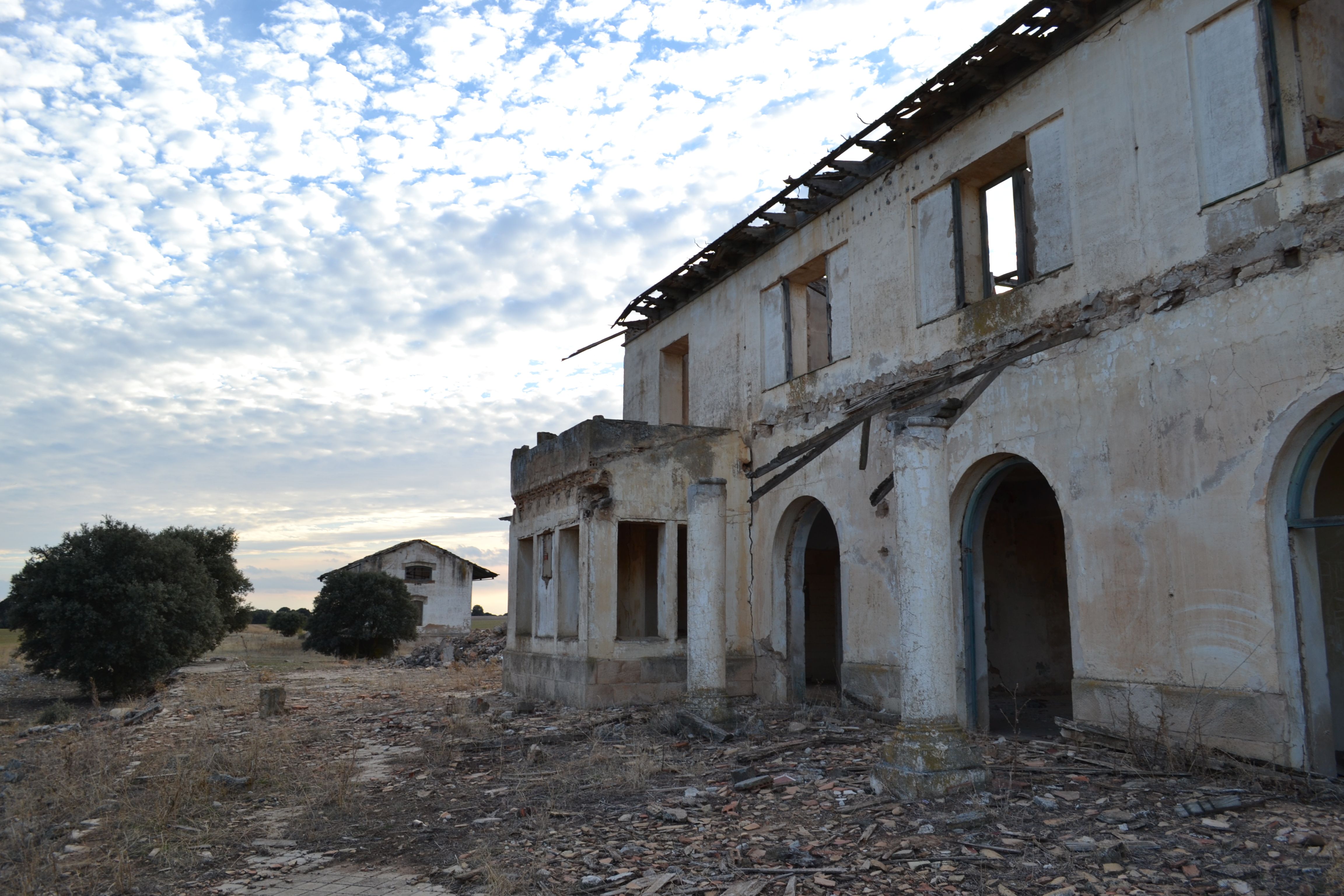 Esta foto corresponde a la antigua estación ferroviaria de Villatobas, denominada Estación de Mudela. Se encuentra en la Vía Verde Don Quijote.